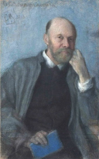 Милорадович Сергей Дмитриевич/ Пастель из собрания Третьяковской галереи.